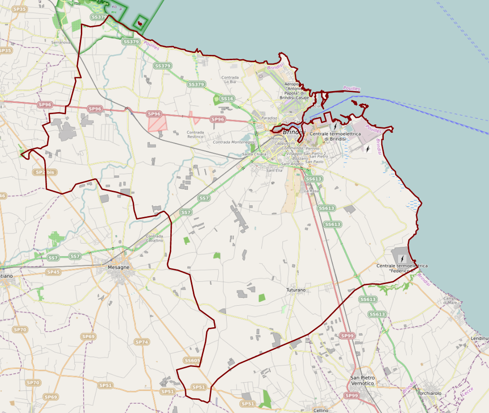 carte réalisée sur umap This map may be incomplete, and may contain errors. Don't rely solely on it for navigation.